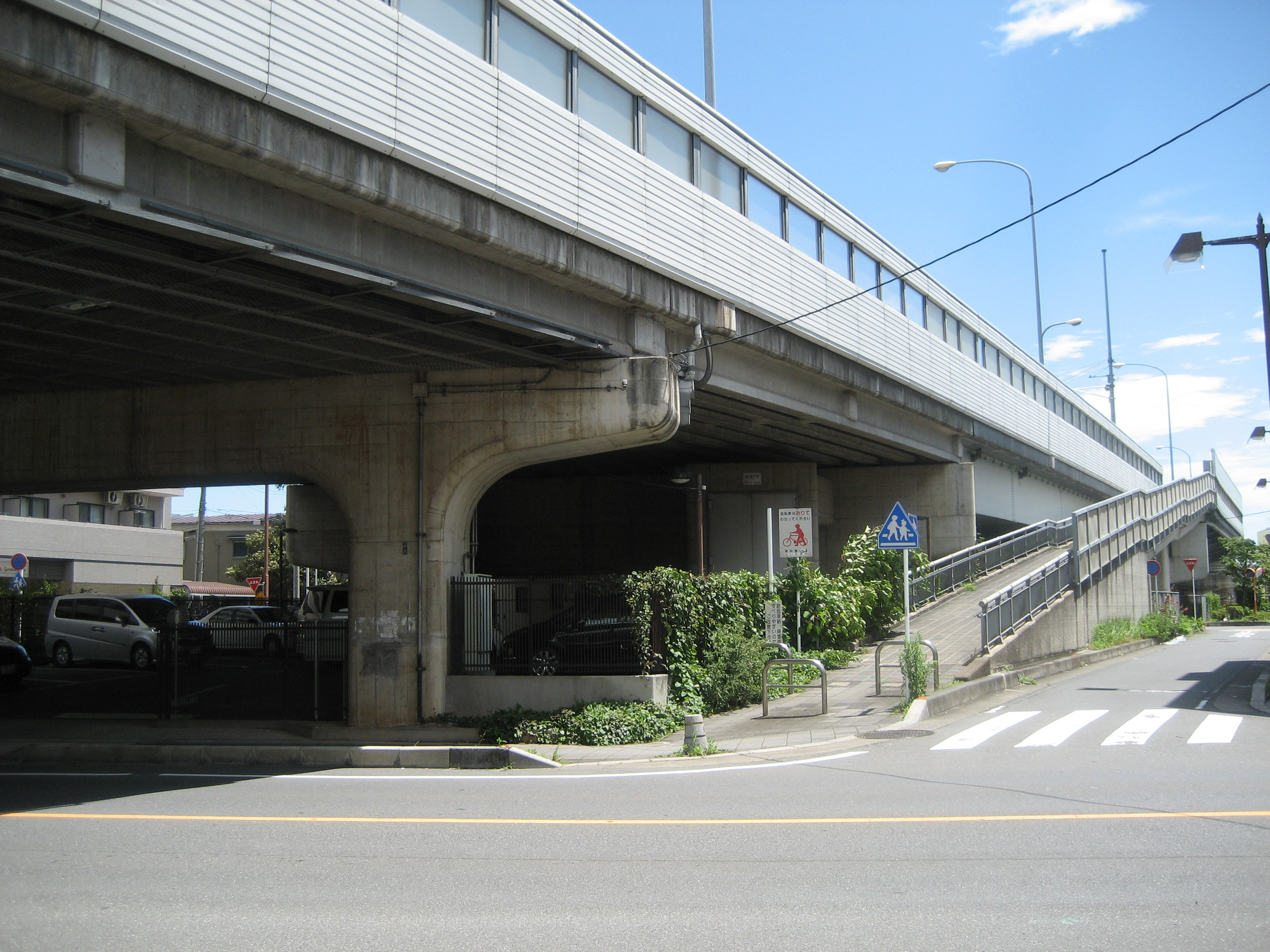 国道４６３号線新浦和橋（埼玉県道65号線との立体交差付近から撮影）